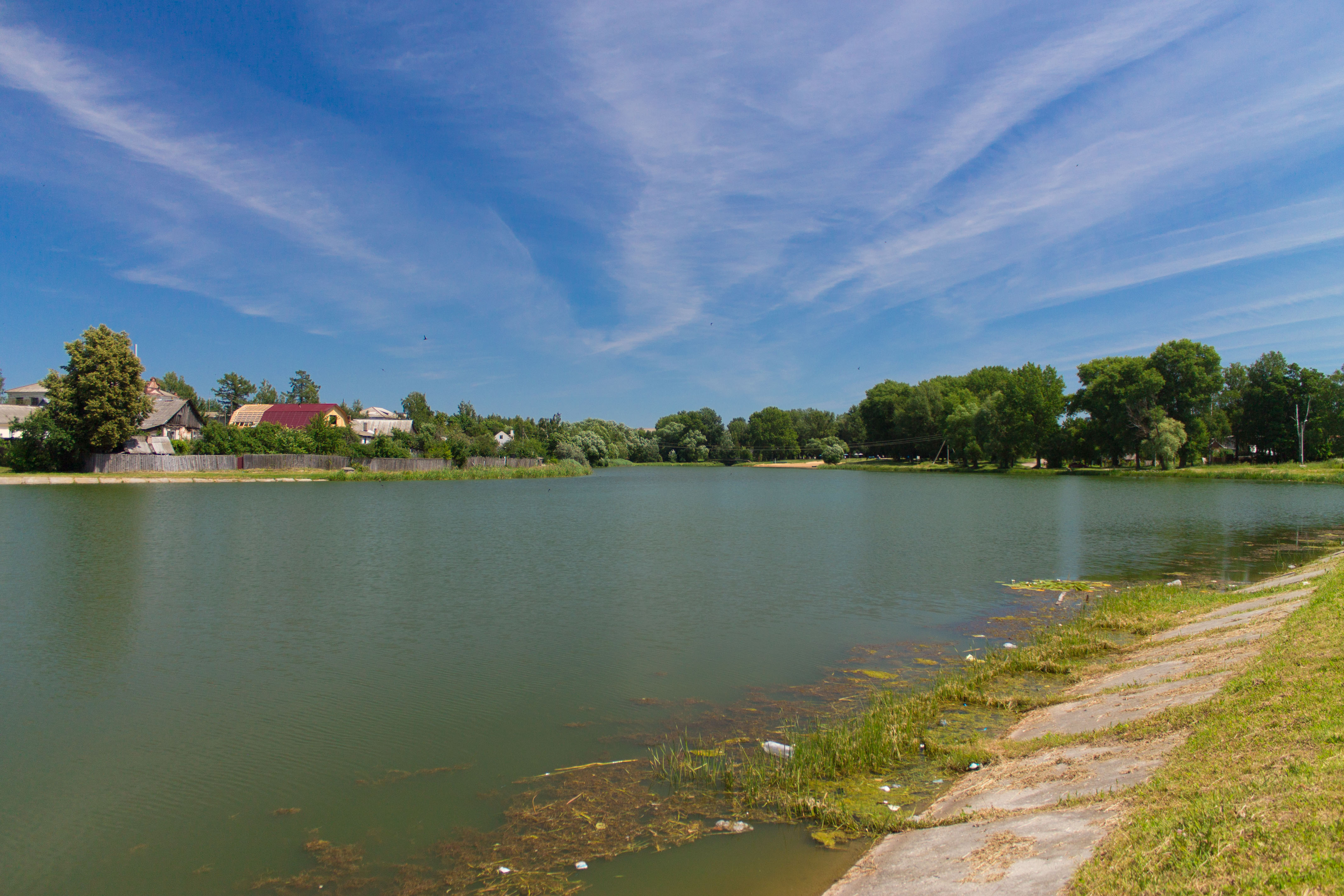 Брянская область, город Новозыбков, озеро Карна.